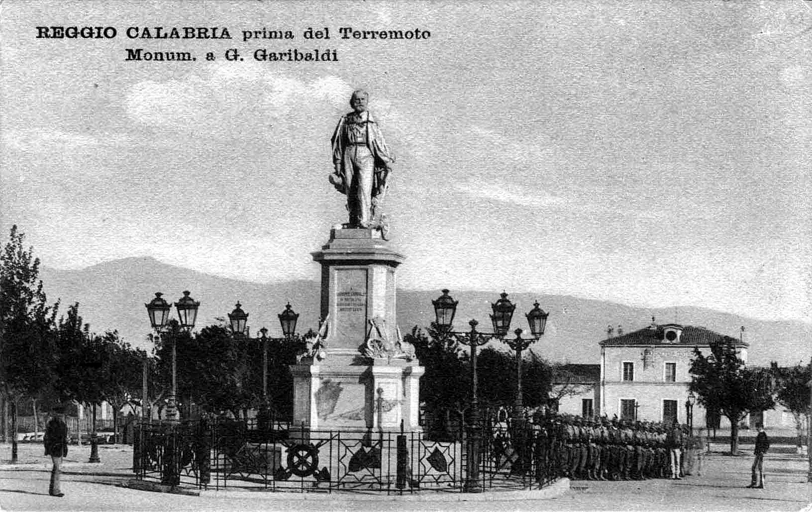 old postcard of Reggio Calabria